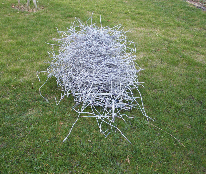 Fuglereir: Spesielt skjorereir, laga av metallkrokar, ved gloppen ungdomskule.